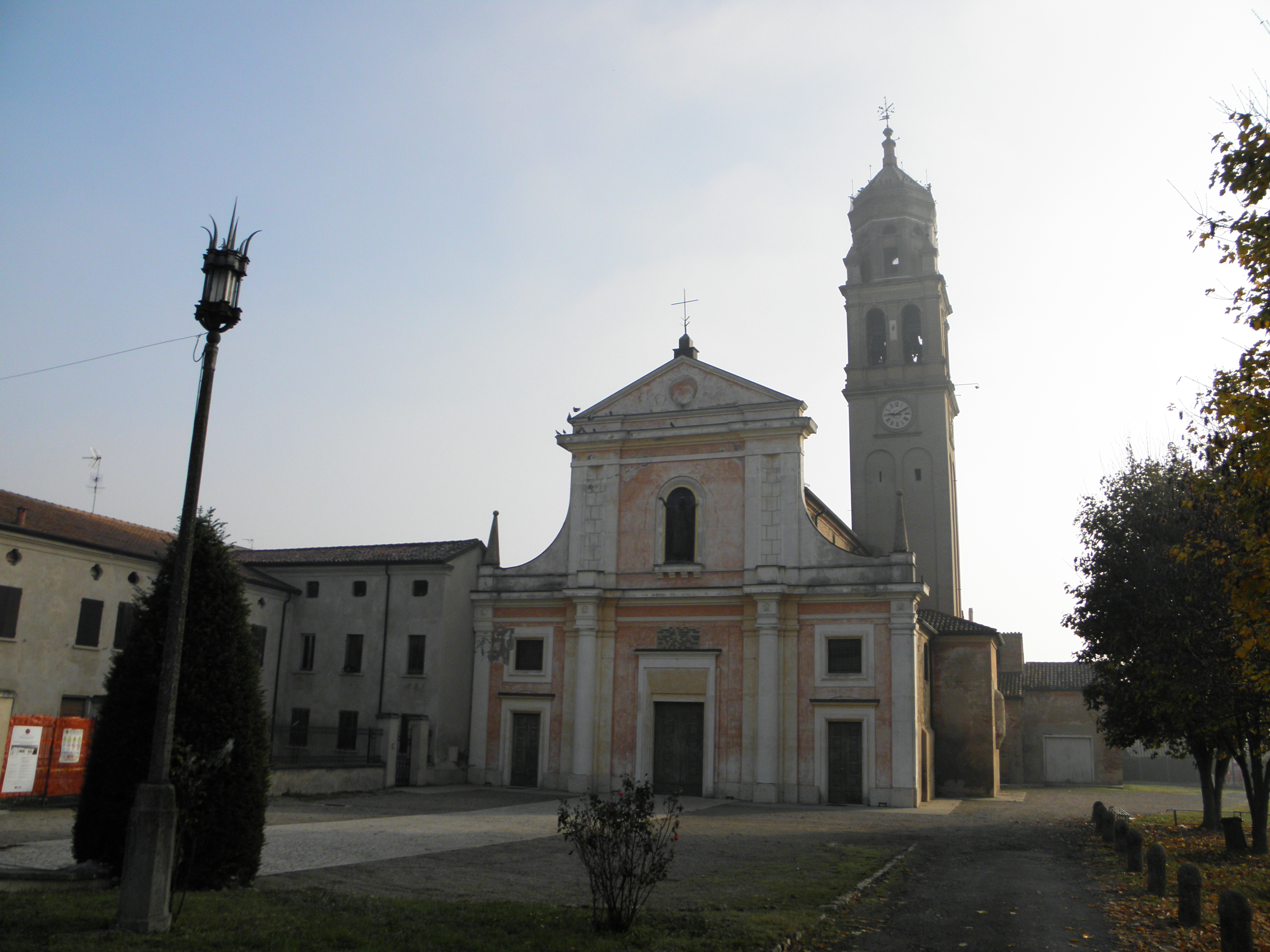 Carbonara di Po, la chiesa parrocchiale di Santa Maria Assunta.